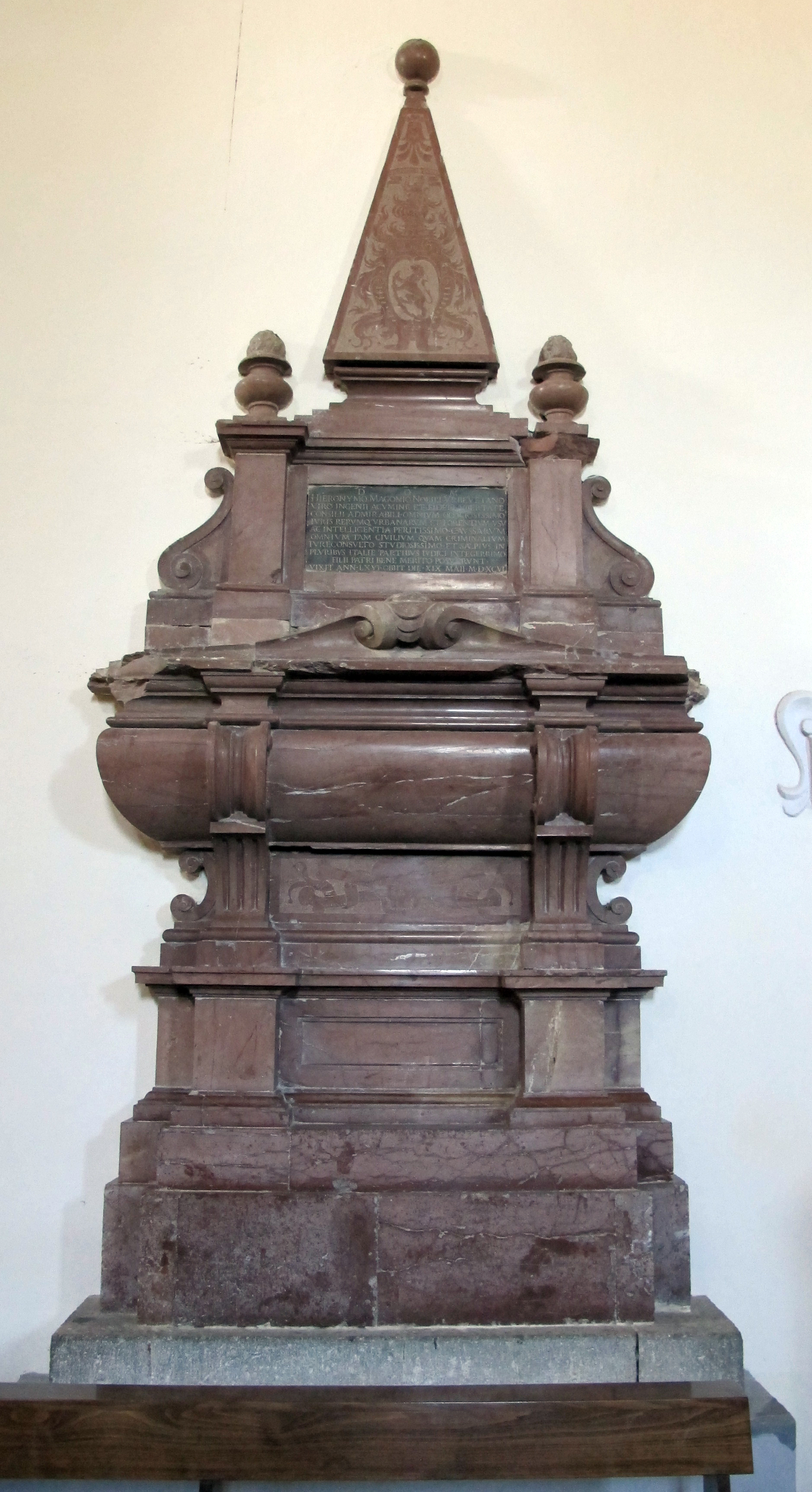 San Domenico (Orvieto)